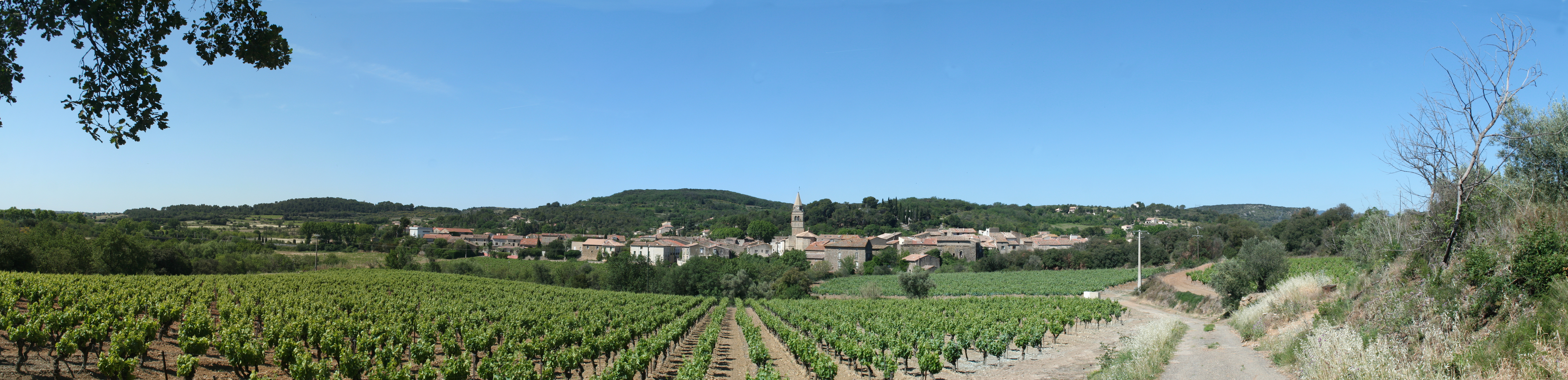 Gabian (Hérault) - panorama